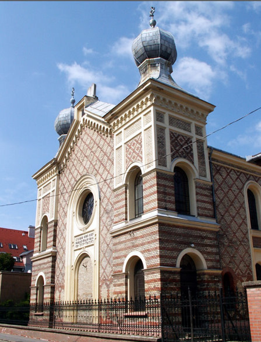 Újpesti zsinagóga (Fotó: Varga Máté